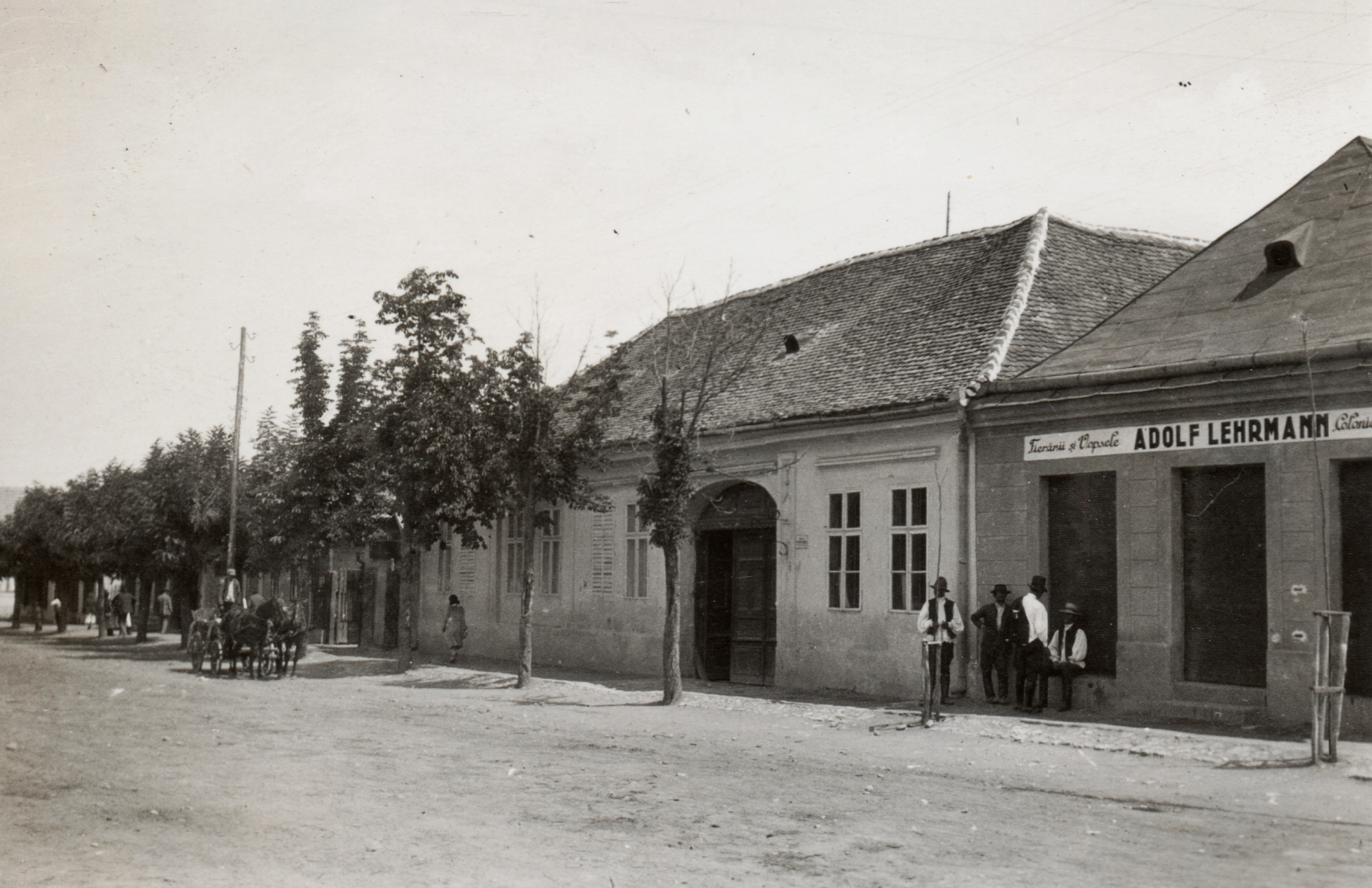 jobbról a második a Péchy-ház. Location: Romania, Transylvania, Jibou Tags: horse Title: jobbról a második a Péchy-ház.